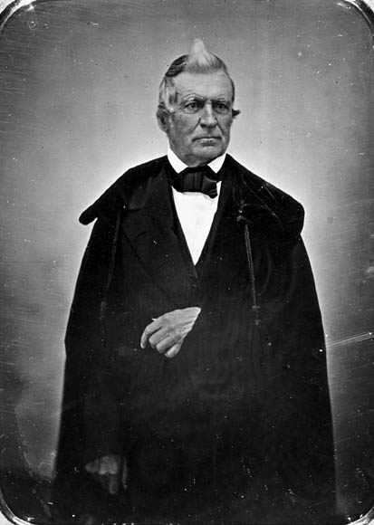 Louis-Joseph Papineau (1786-1871). Daguerréotype.